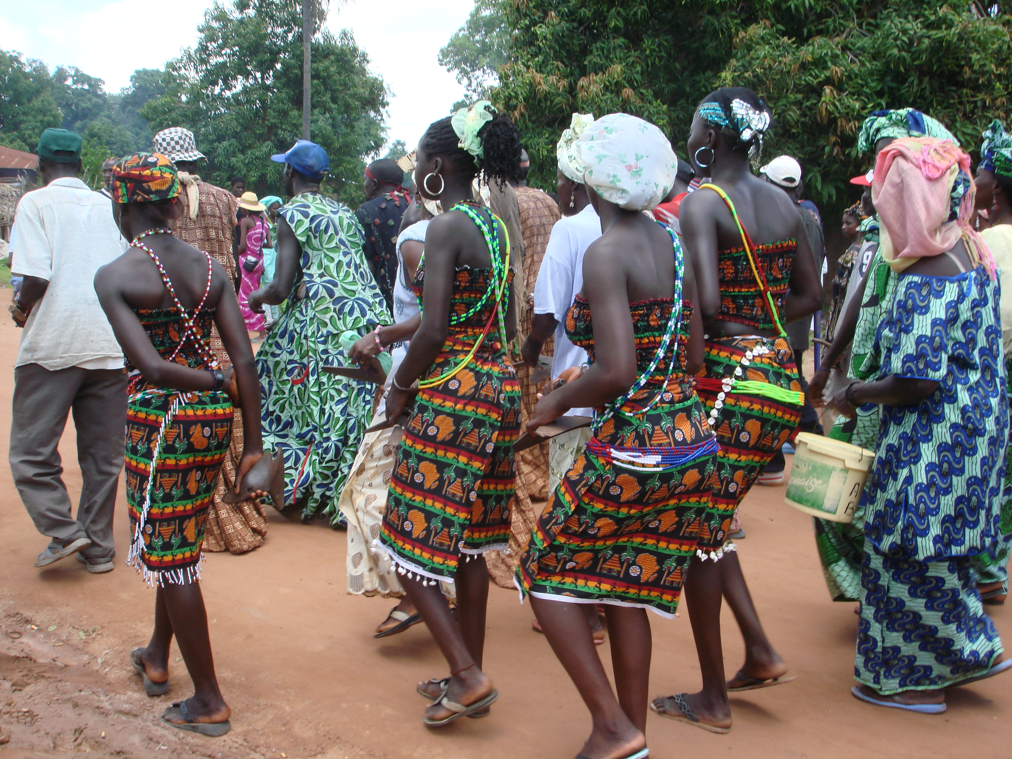 Jeunes filles diola lors du boukout (rites d'initiation) de Baïla en août 2007 (Casamance, Sénégal)